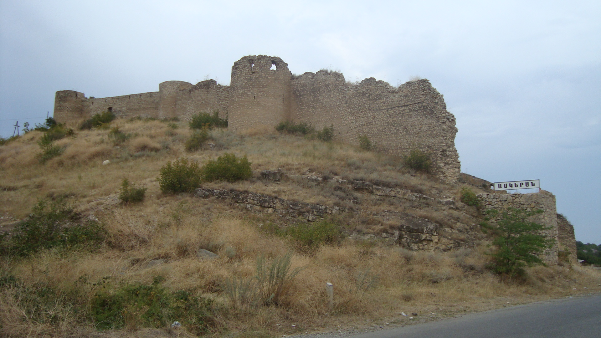 Askeran fortress. Askeran, Azerbaijan / Republic of Mountainous Karabakh (Artsakh).